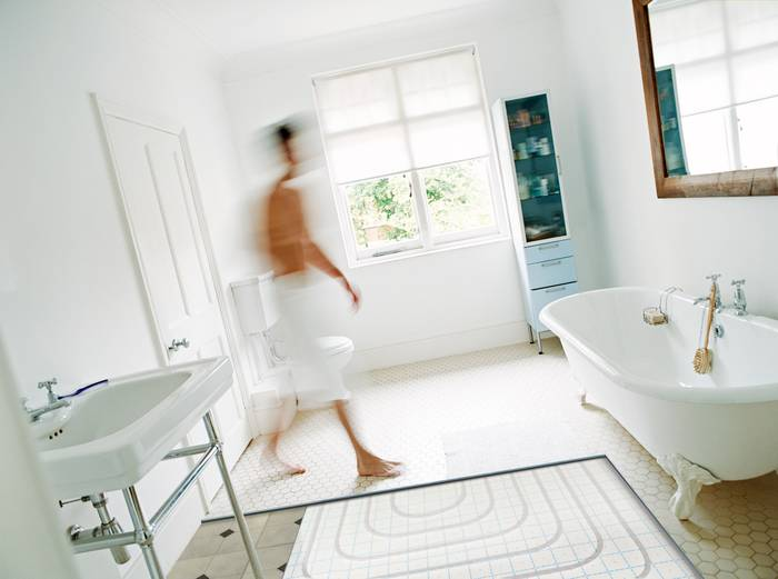 Podlahové vytápění